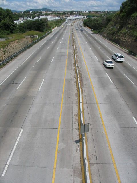 Autopista México-Querétaro (carretera 57) pasando por San Juan del Río